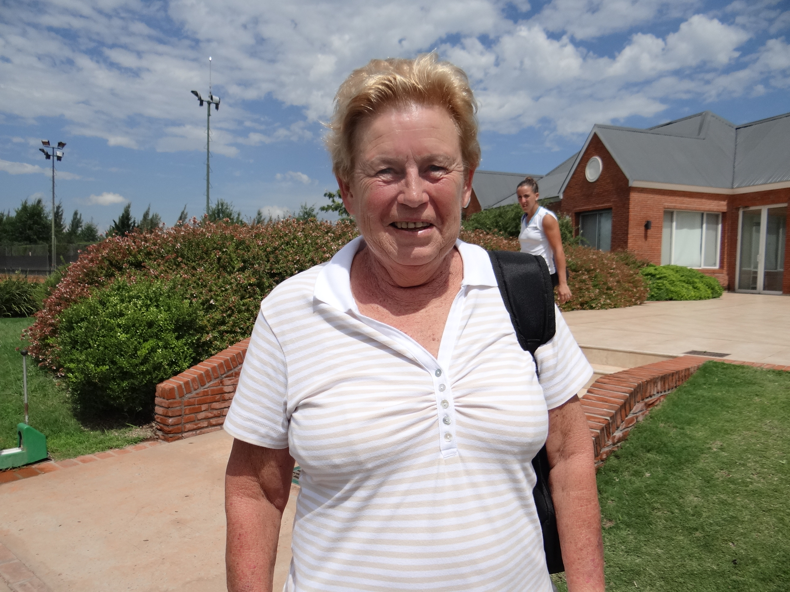 Norma Baylon durante el primer día de la serie Argentina - Japón (Grupo Mundial II de la Fed Cup)